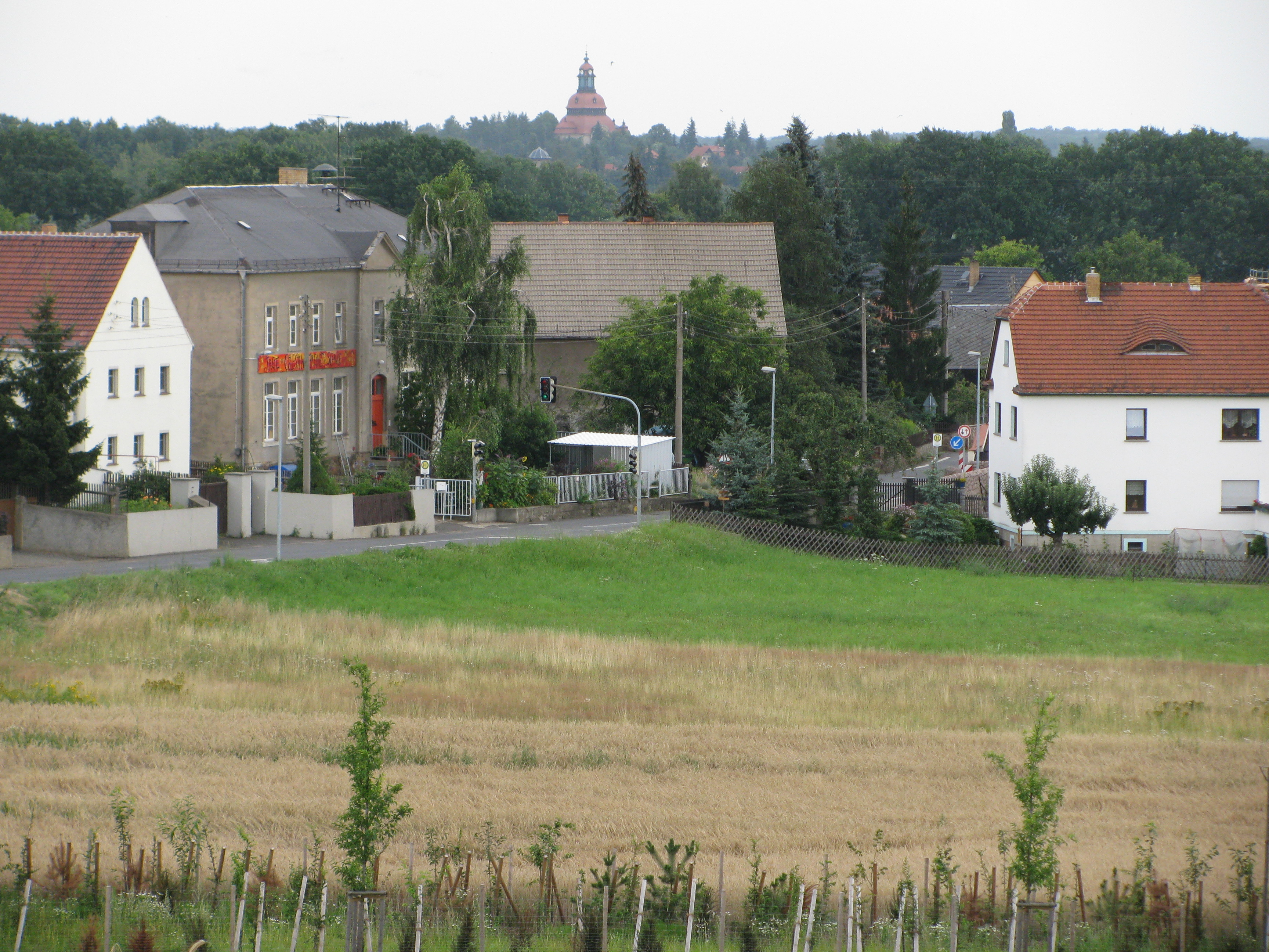 Häusergruppe in Dippelsdorf, Friedewald, Moritzburg, Sachsen. U. a. freie Celestin-Freinet-Schule/Grundschule Dippelsdorf (graues Gebäude mit Schindeldach und orangebrauner Tür). Im Hintergrund die Moritzburger Kirche.